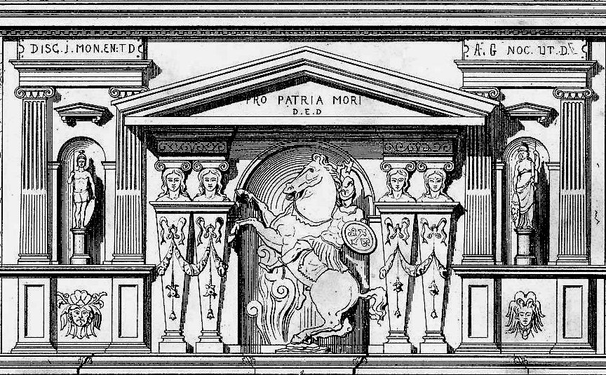 Zeichnung eines relief-verzierten Sandsteinkamins auf Schloss Hugenpoet in Essen-Kettwig